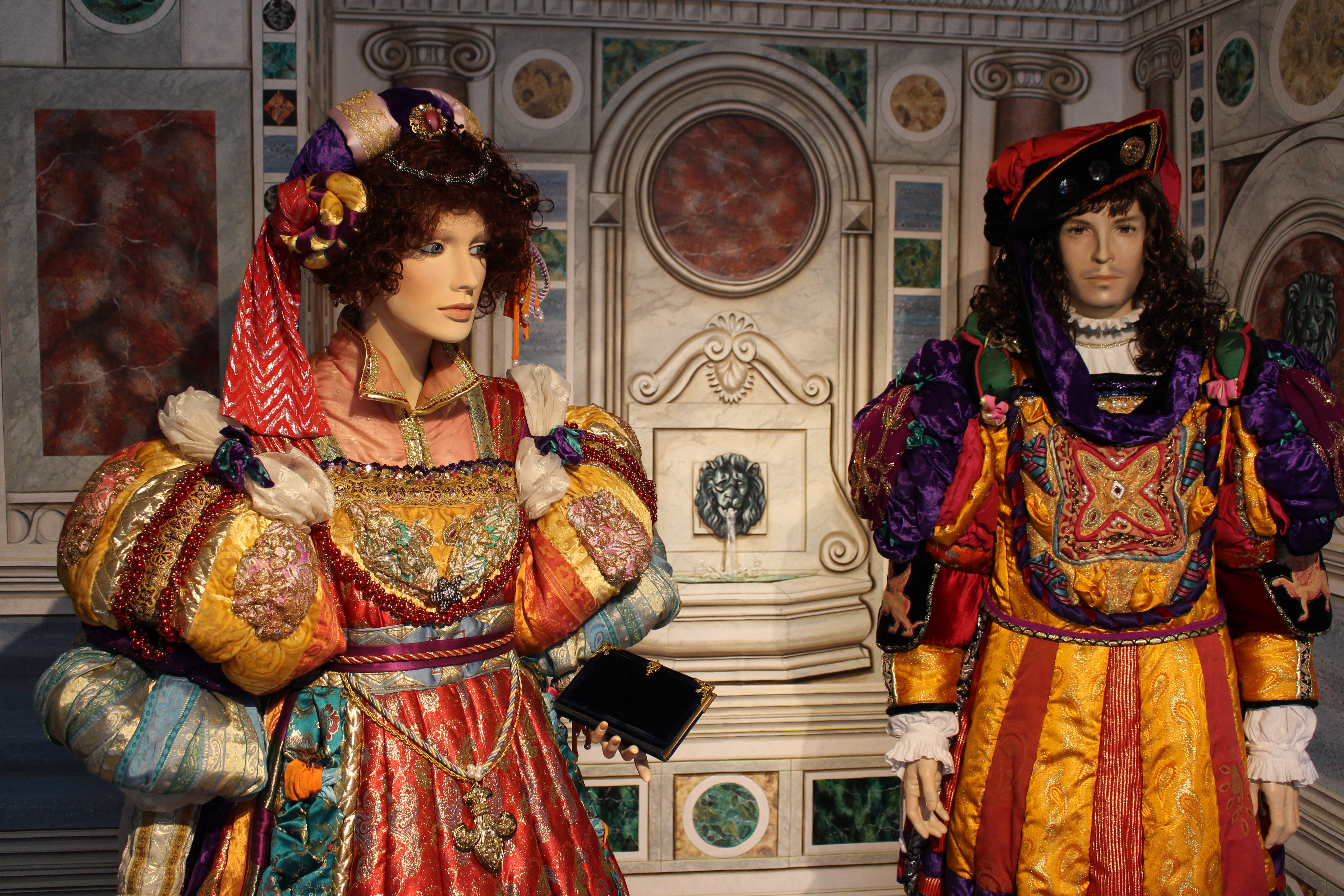 Die Kostueme und Wandmalerei im Gewandhaus Museum Inneringen unterliegen dem Urheberrecht von Ilse Wolf und Katja Morrison. Bilddatei von Katja Morrison The costumes and wall paintings in the Gewandhaus Museum Inneringen have been created by Ilse Wolf and Katja Morrison, all rights reserved. Image by Katja Morrison